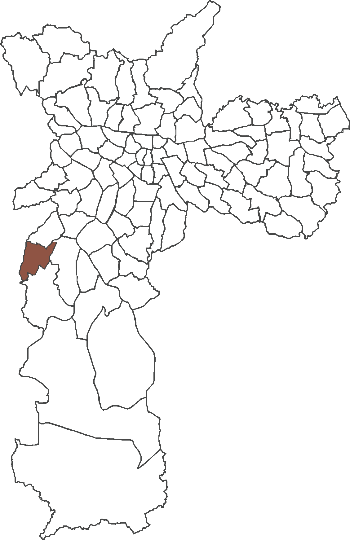 Localização do distrito do Capão Redondo no município de São Paulo.